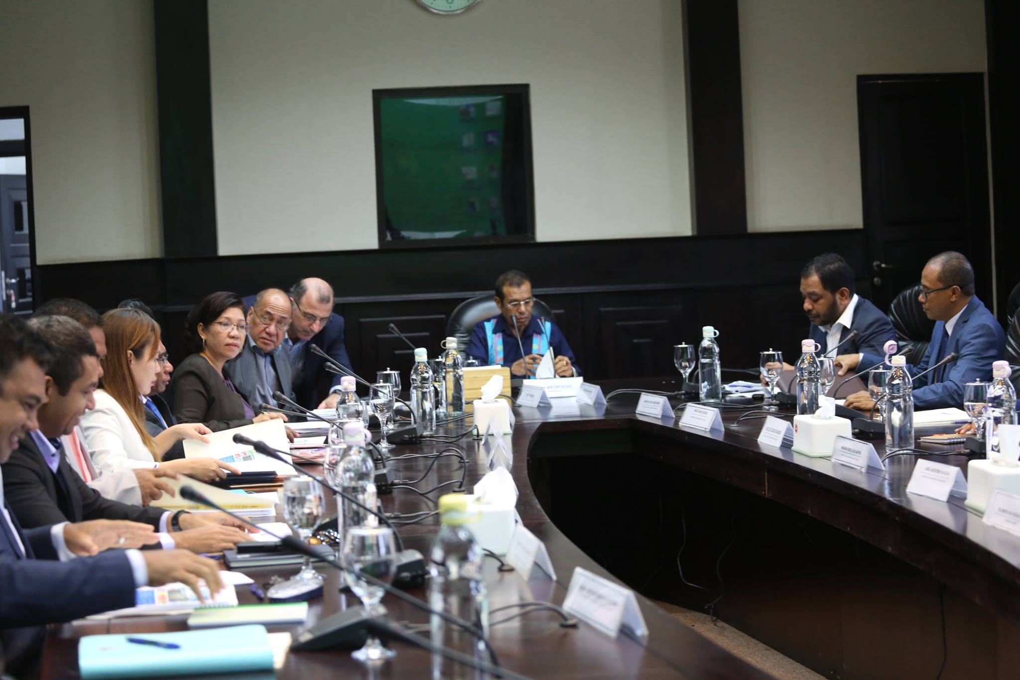 Sitzung des Regierungskabinetts unter Leitung von Premierminister Taur Matan Ruak.